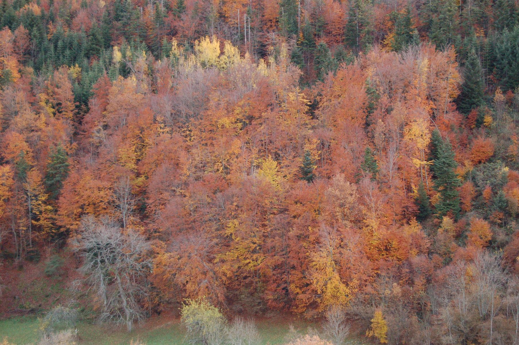 Bois de Chazelles vu du Bénéfice dans la vallée de Saint-Austremoine. L'automne montre la grande diversité de cette forêt donnant un magnifique patchwork de couleurs.